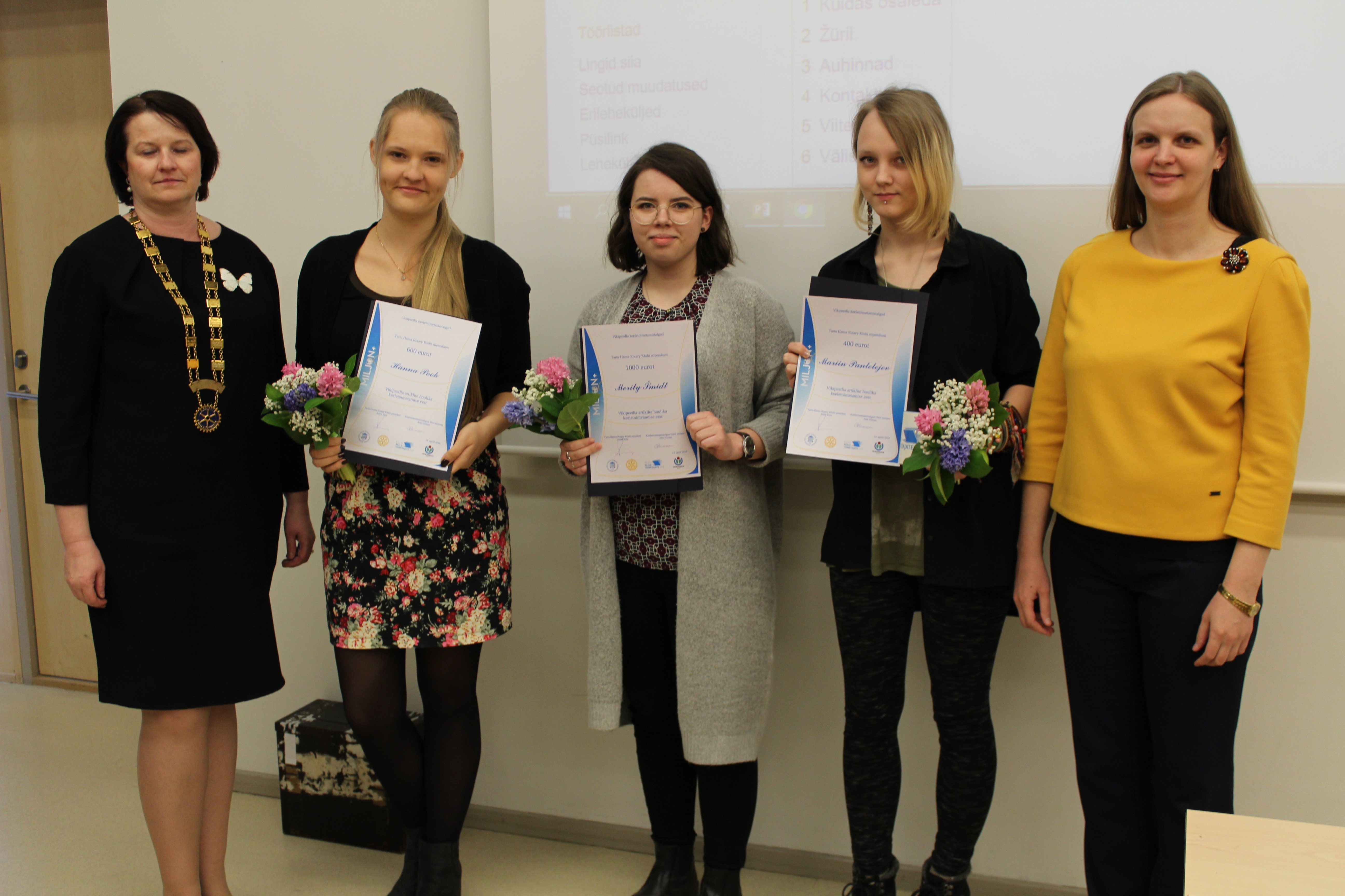 Keeletoimetamistalgute parimate auhindamine 14.04.18 TLÜ-s. Vasakult: Aime Keis (Tartu Hansa Rotary Klubi president), Hanna Pook (II koht, TÜ), Merily Šmidt (I koht, TÜ), Mariin Pantelejev (III koht), Ann Siiman (žürii esimees, TÜ). Foto autor Egle Heinsar.